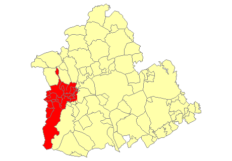 Términos municipales pertenecientes al Aljarafe